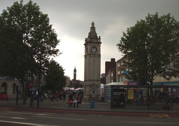 Люишем Хай-стрит, Лондон, Великобритания